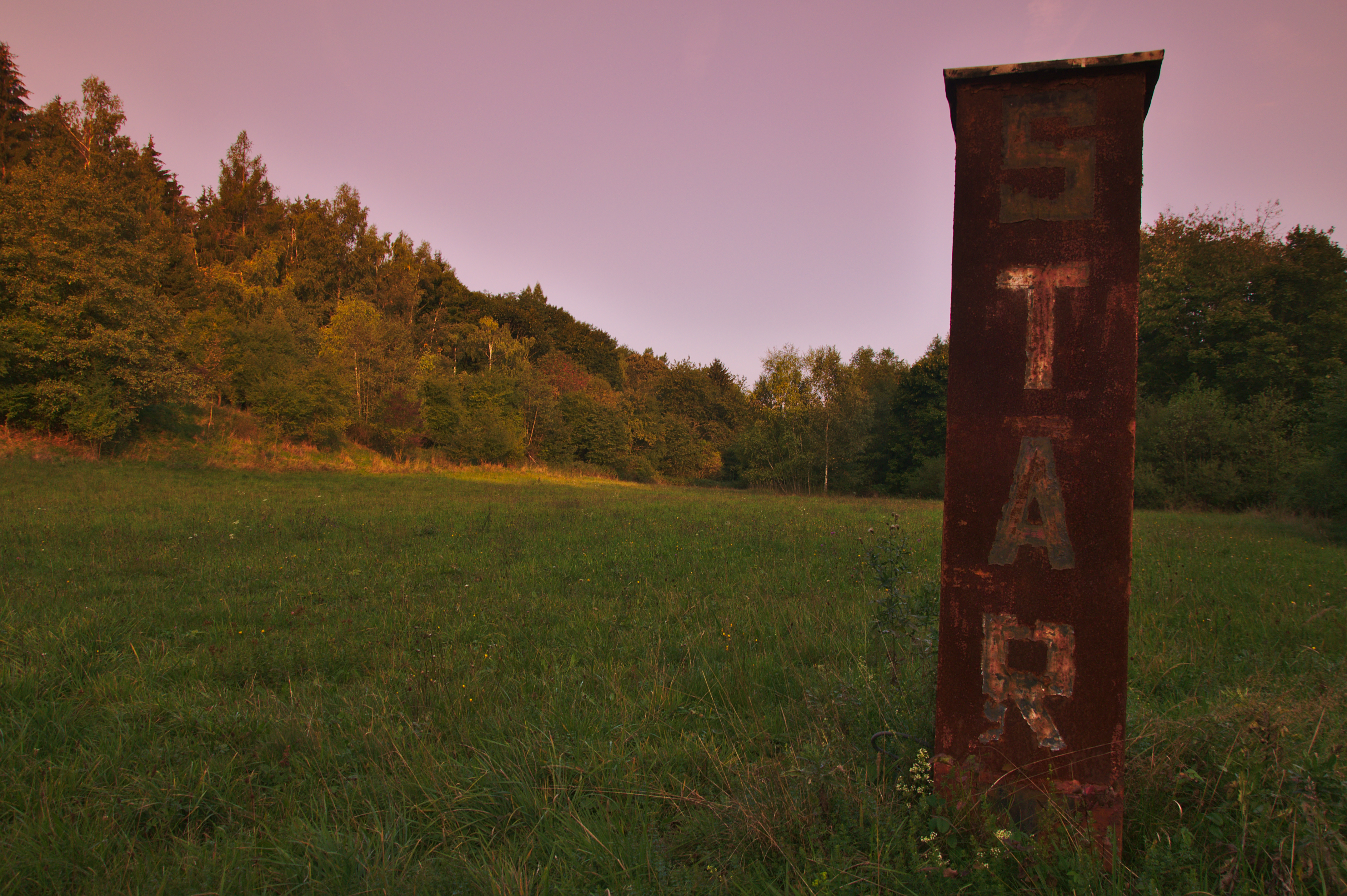 Motokros, Lipová, okres Prostějov